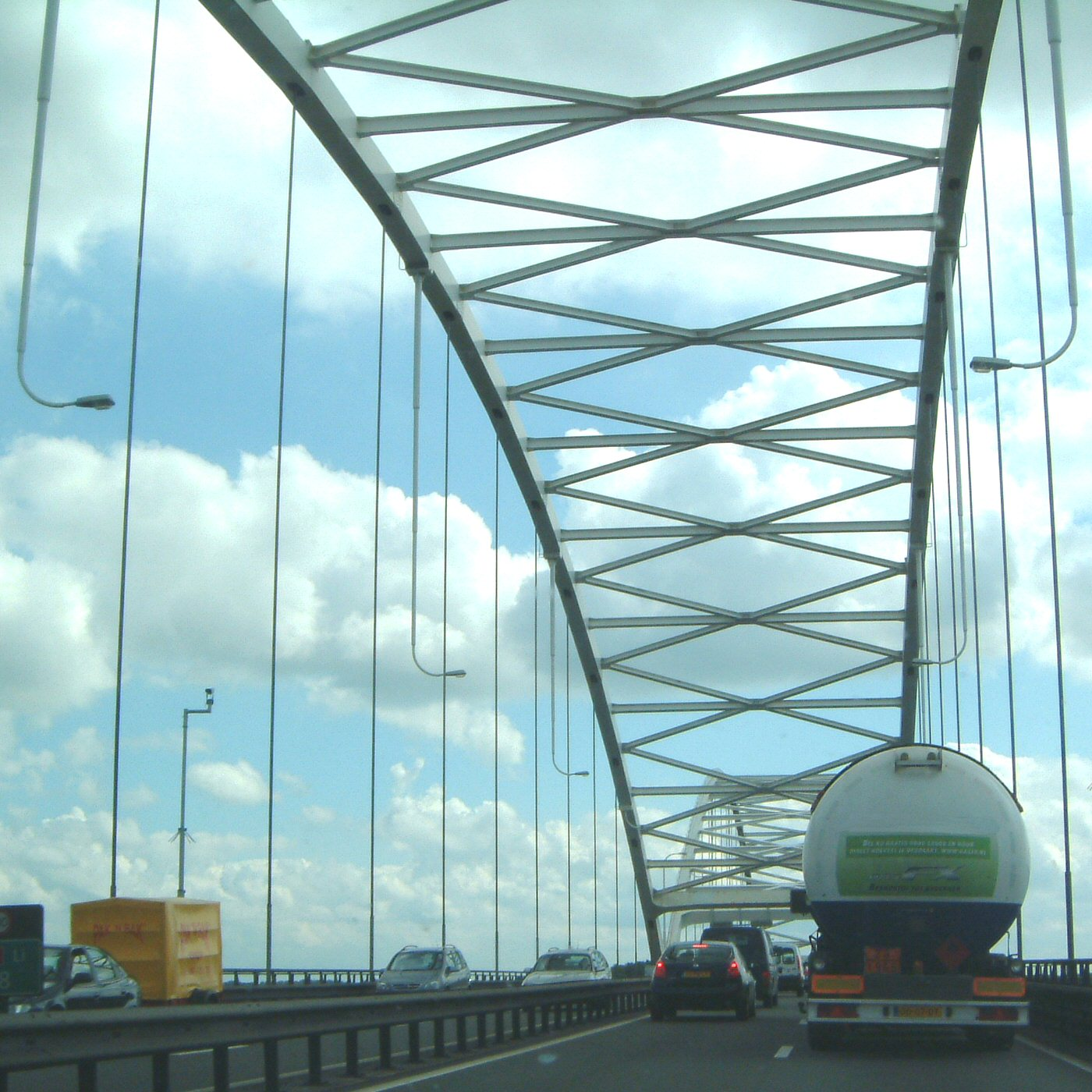 Merwedebrug